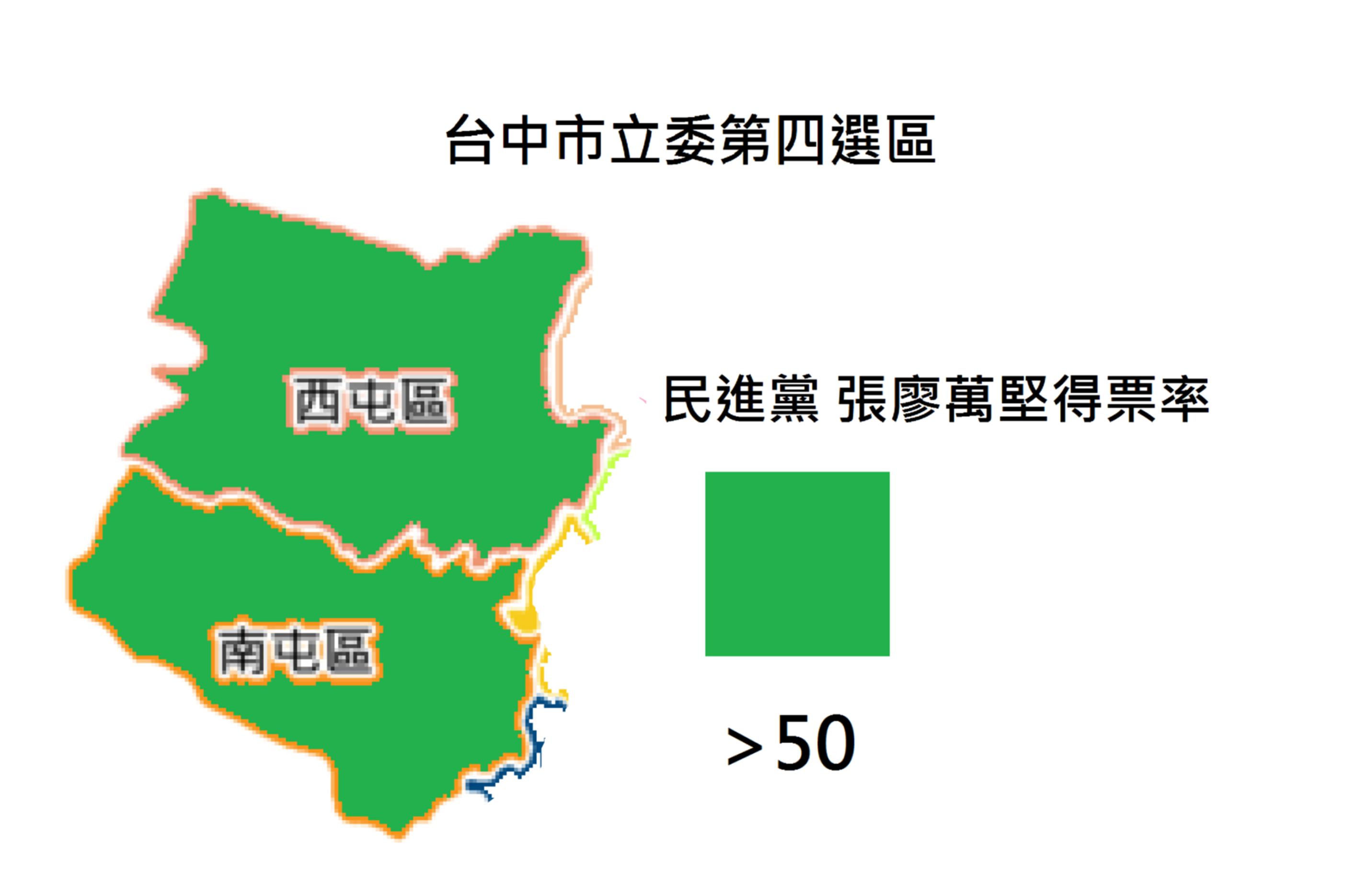 2016台中市第四選區立委各區得票率